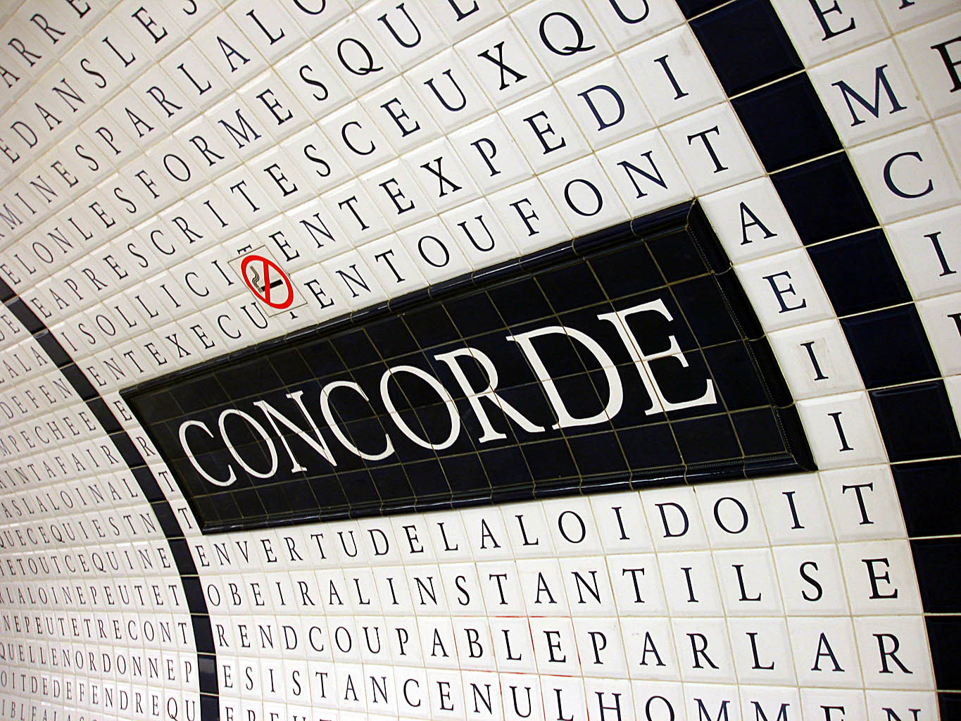 Inscription sur carreaux de céramique, lettres bleues sur fond blanc reconstituant le texte de la Déclaration des droits de l'homme et du citoyen de 1789, 1991, station de métro Concorde de la ligne 12 du métro de Paris, France.